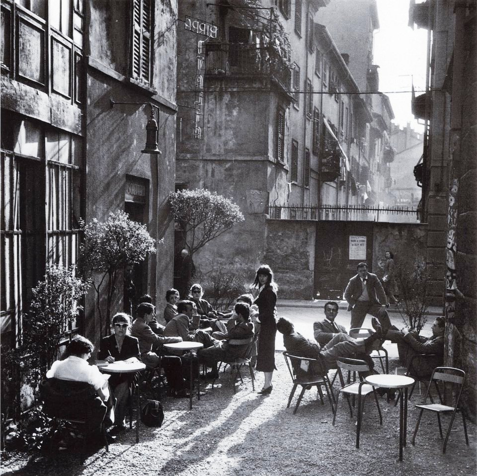 Milano, vicoli di Brera